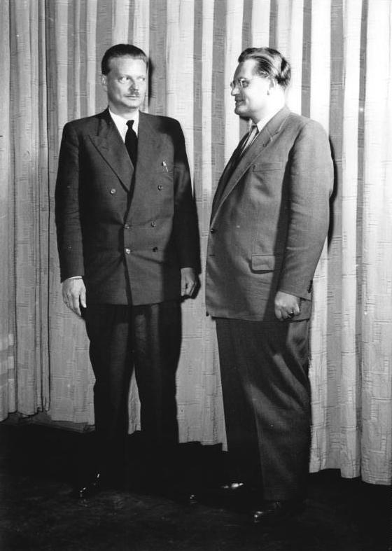 Zentralbild Schw.Quasch.- 13.7.1955 - B. Piasocki, Vorsitzender der PAX-Gruppe in Warschau (links) und Gerald Götting, Generalsekretär der CDU.